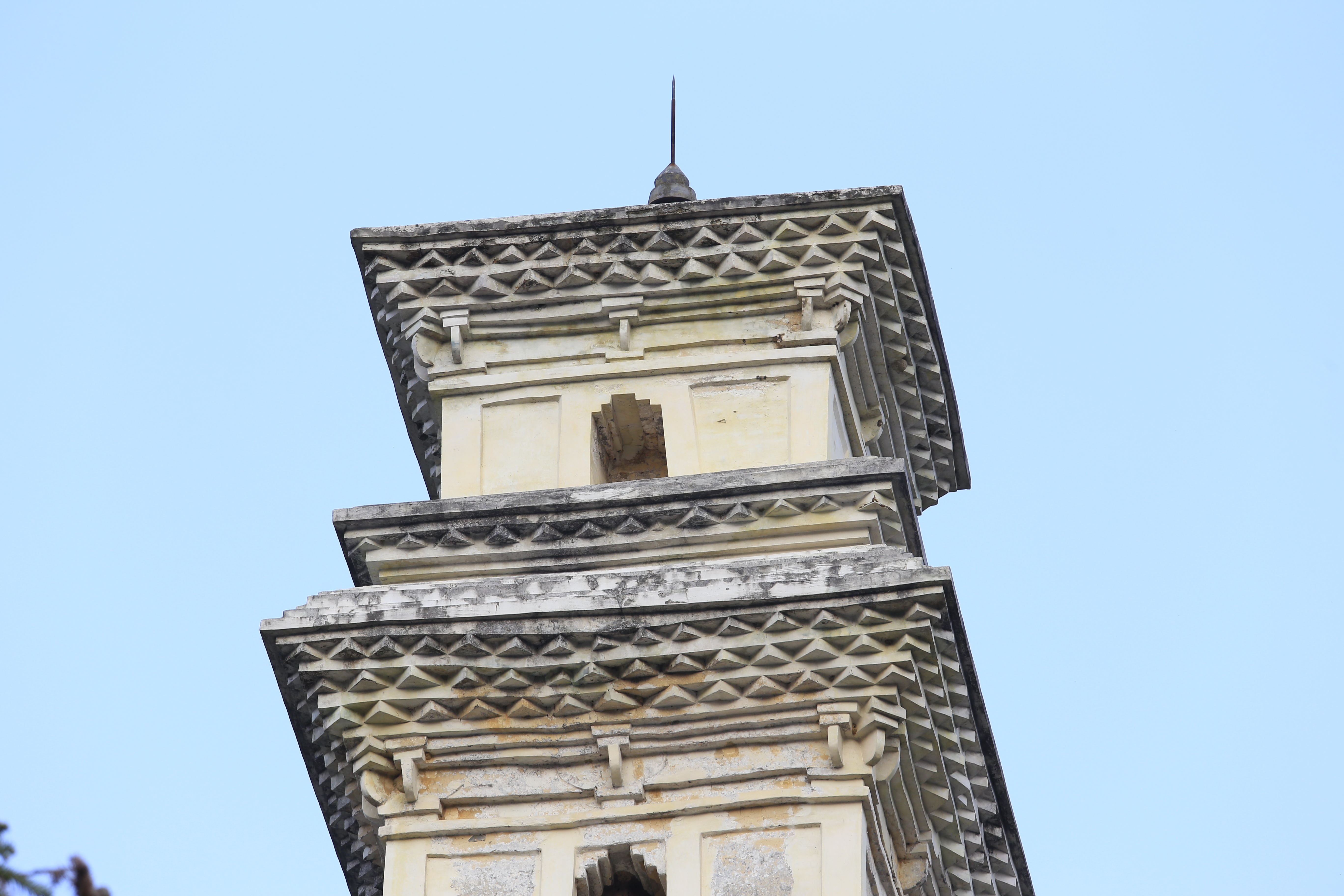 仁化县澌溪寺塔